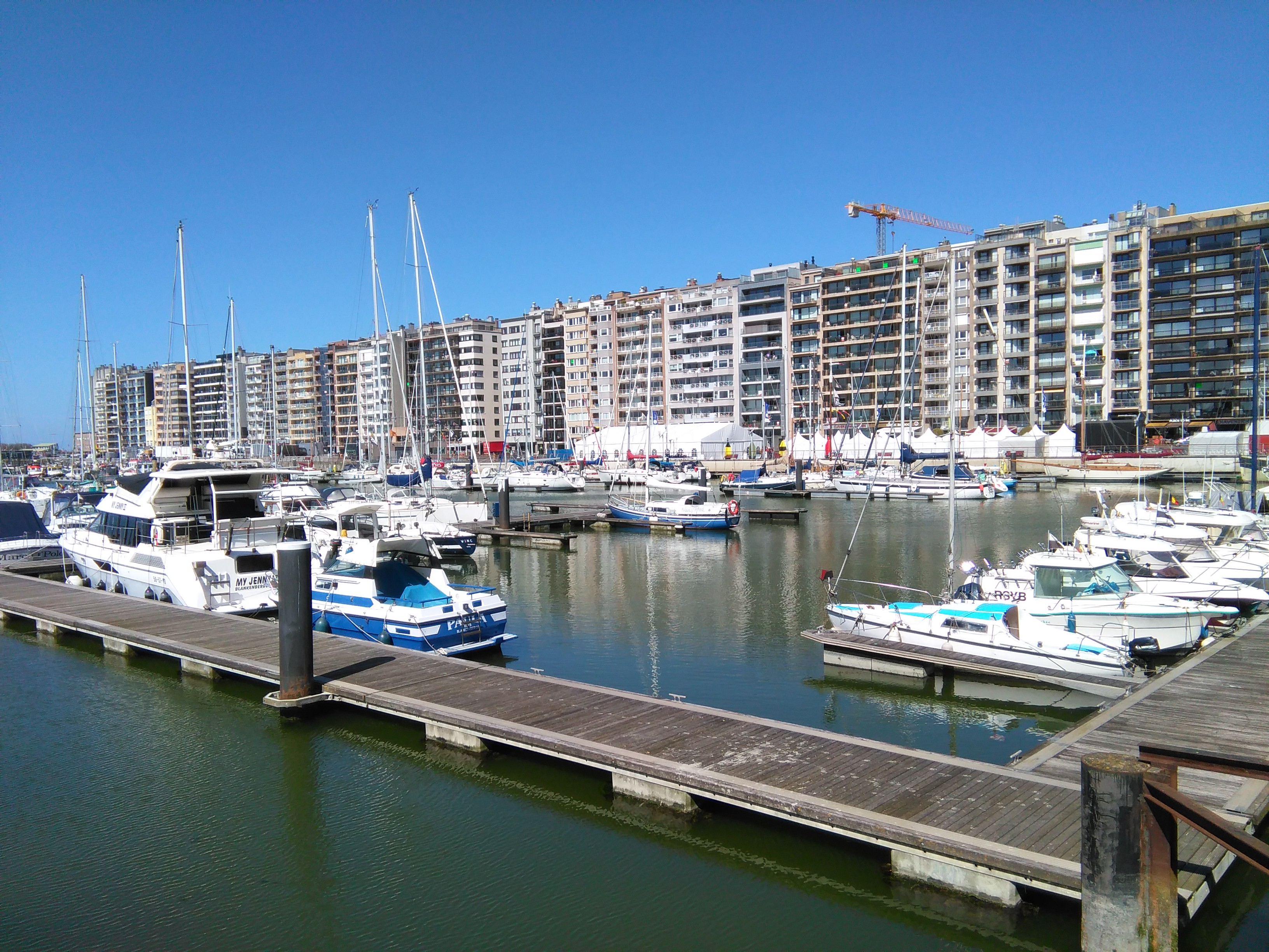 zicht op de oude haven en de Franchommelaan